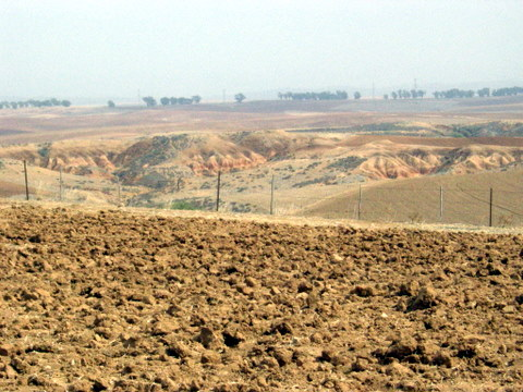 shikma